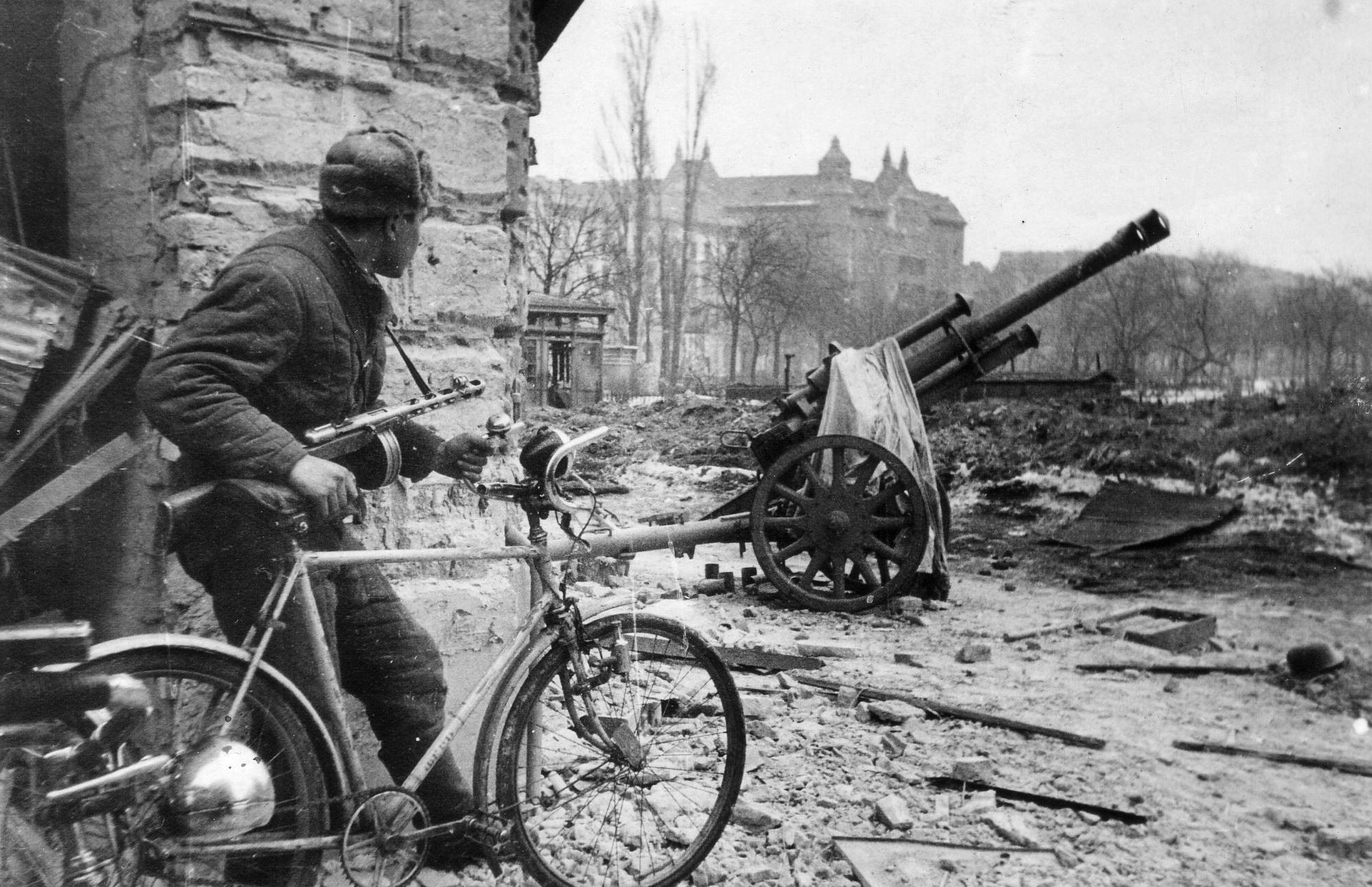 Kálvária tér - Losonci utca sarok. Location: Hungary, Budapest VIII. Tags: Soviet soldier, bicycle, machine gun, cannon, PPS machine gun, ordnance, second World War, war damage, Budapest Title: Kálvária tér - Losonci utca sarok.